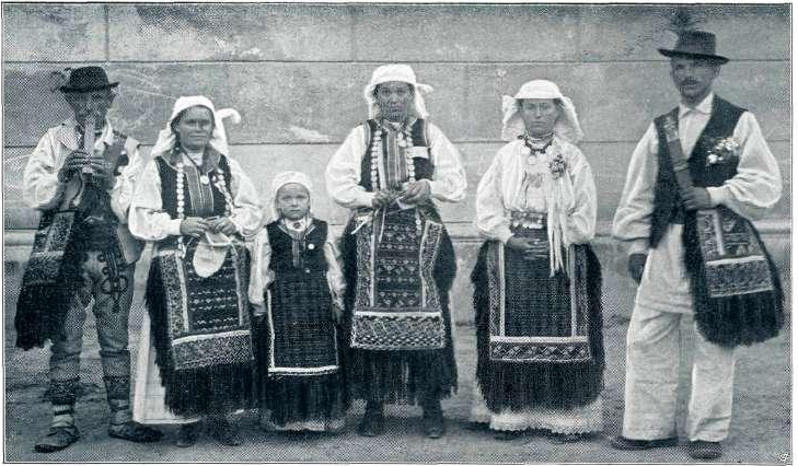 Bojanci in Bojanke.